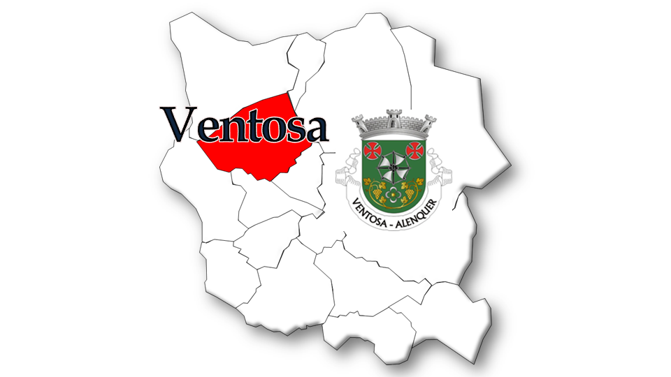 Evolução da População